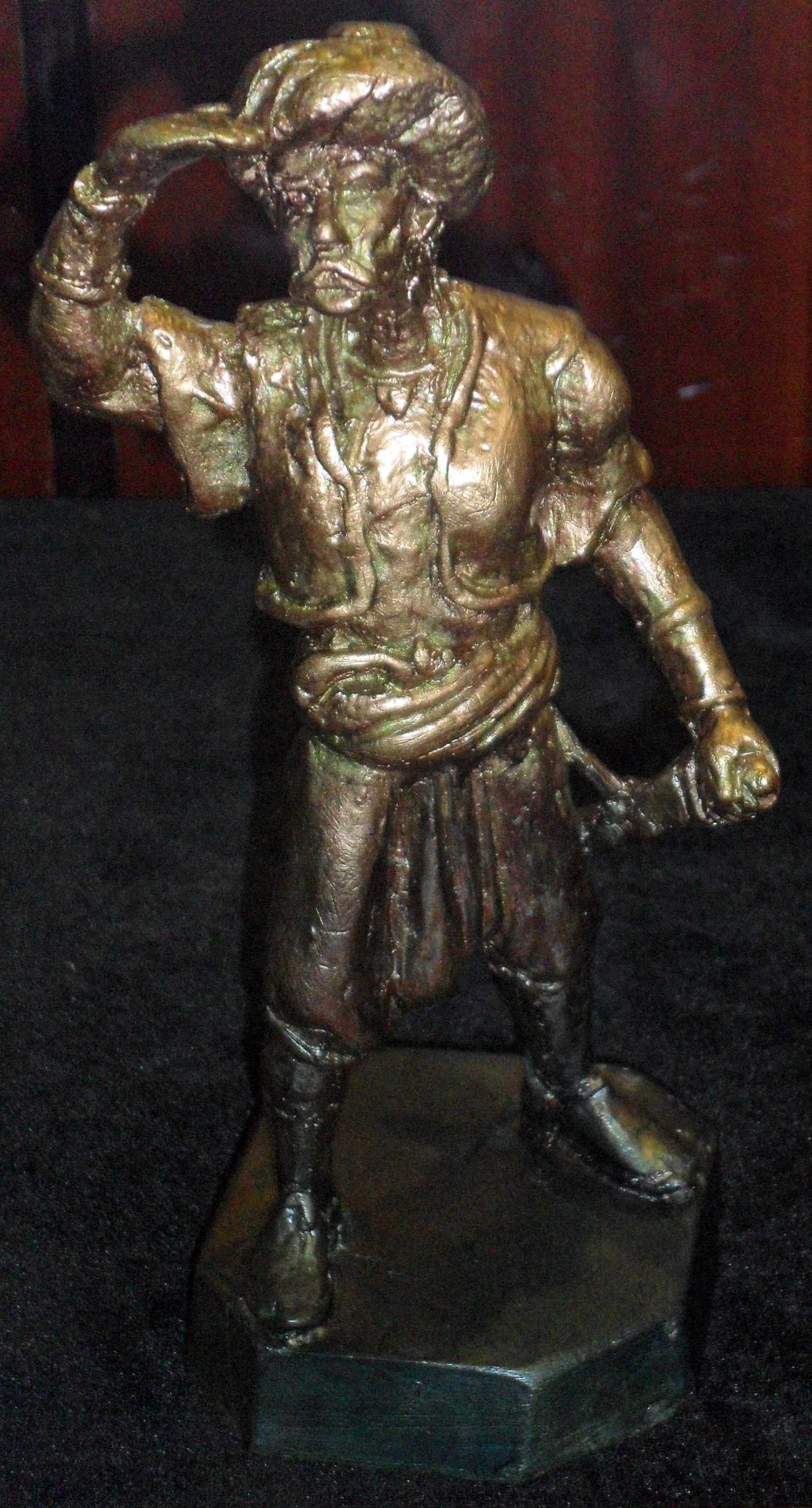 Mersin Deniz Müzesinde sergilenmekte olan bir gözcü levent heykelciği.